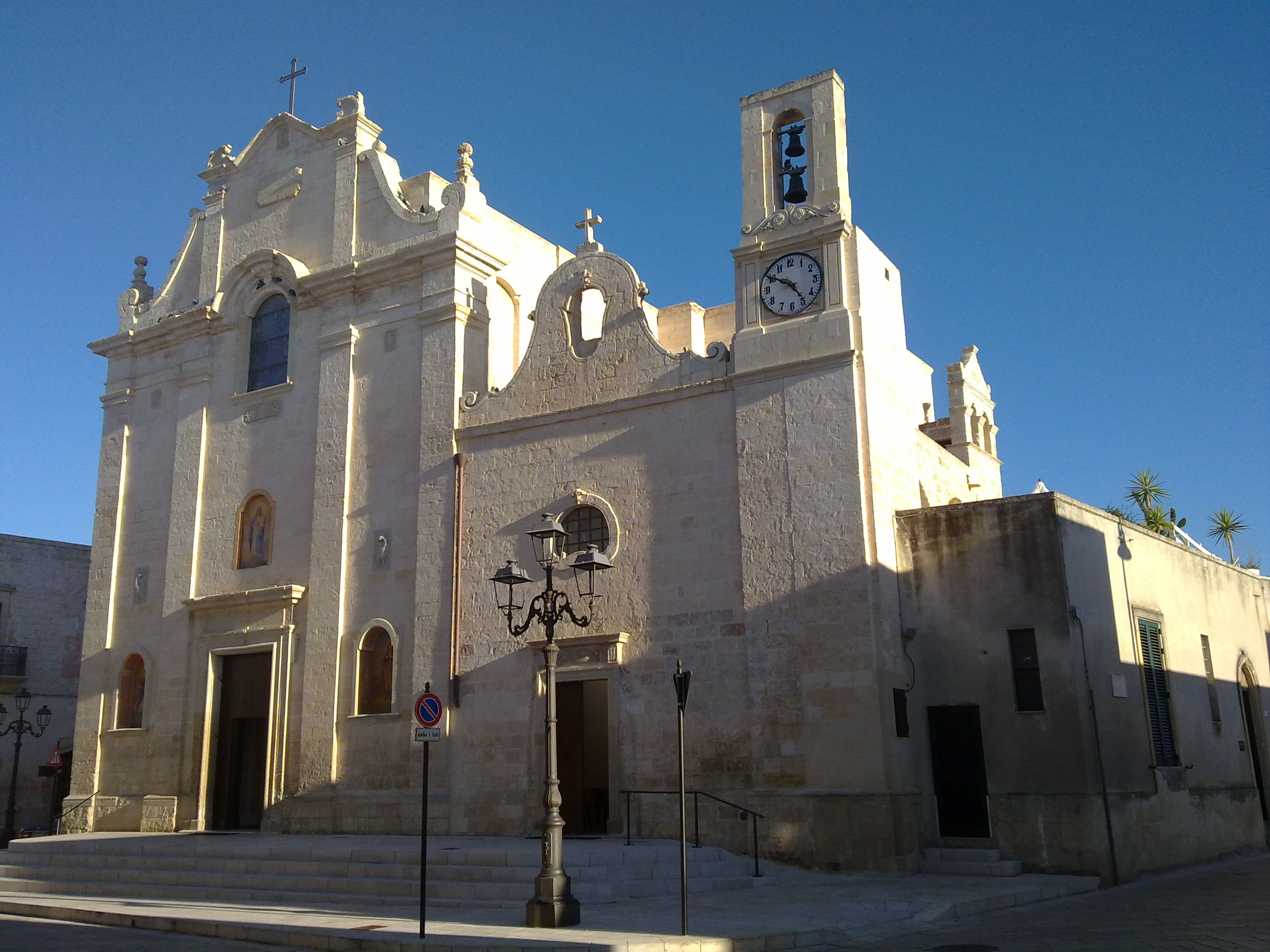 Chiesa Maria SS. Assunta Surano, Lecce